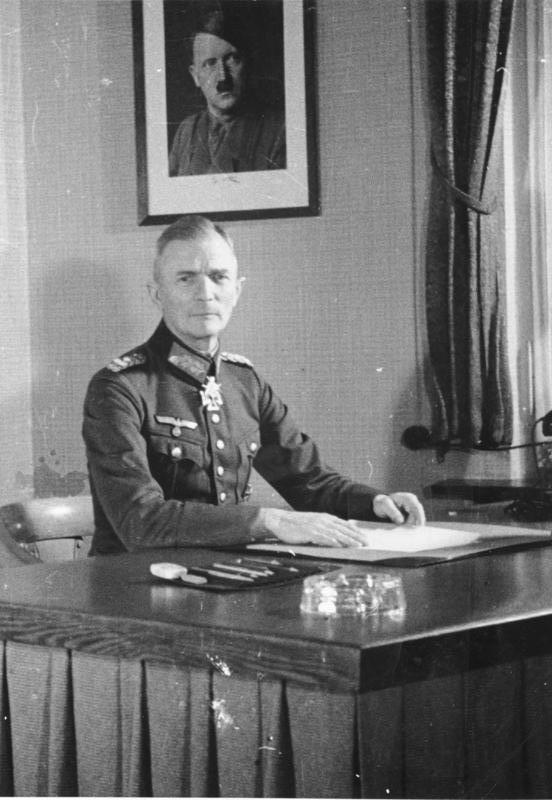 Generaloberst [Fedor von] Bock, 2293-40